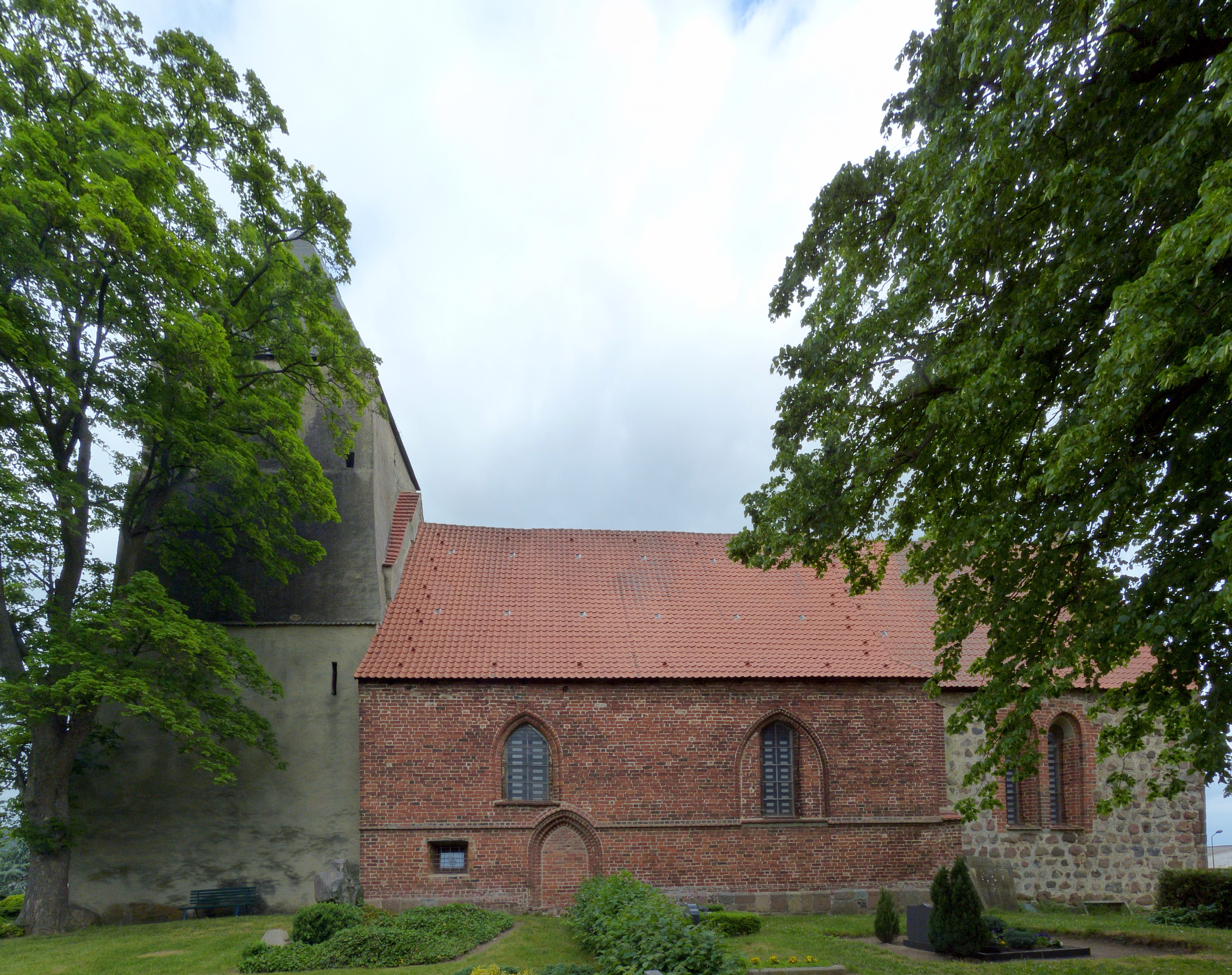 Rakow (Klein Rakow), Süderholz, Kirche, Südseite